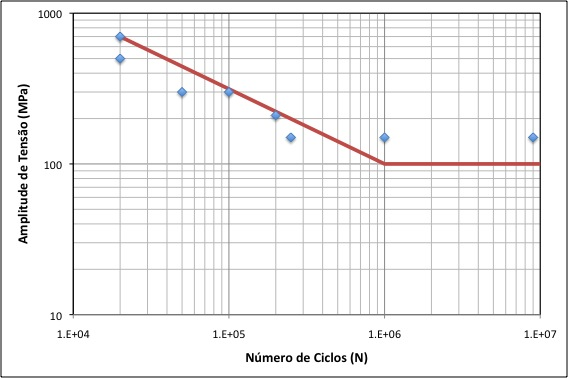 Curva de fadiga esquemaica